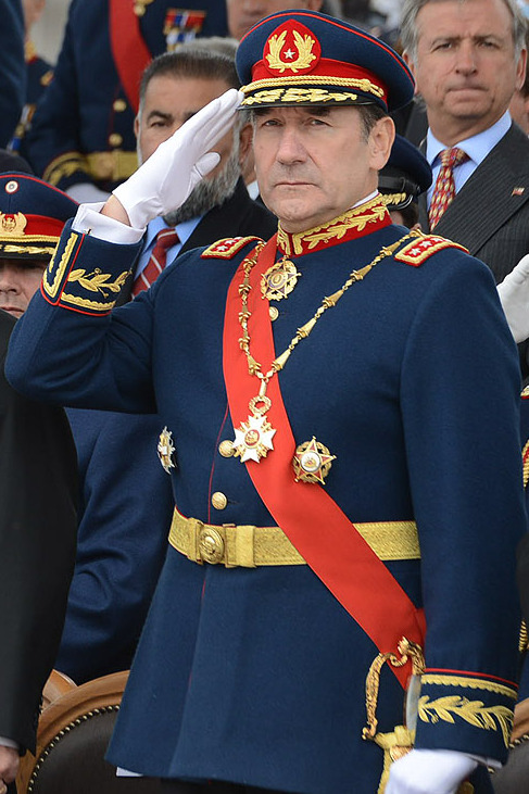 19-09-2012 Gran Parada Militar